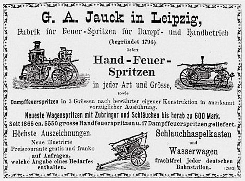 Anzeige der Leipziger Firma G. A. Jauck für Feuerlöschgeräte